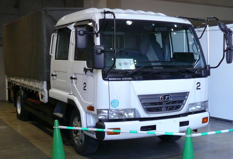 東京消防出初式にて撮影。